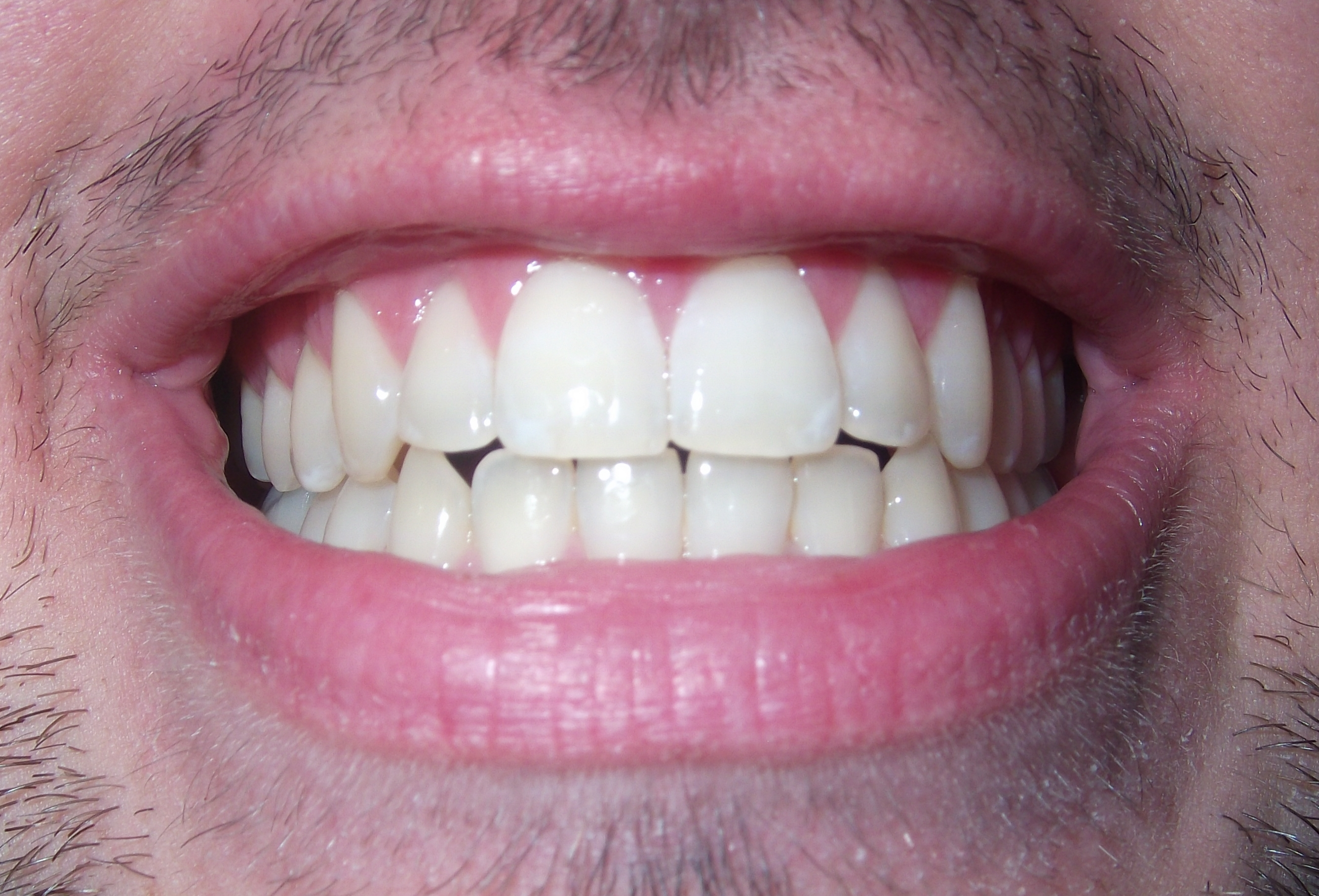 Human teeth